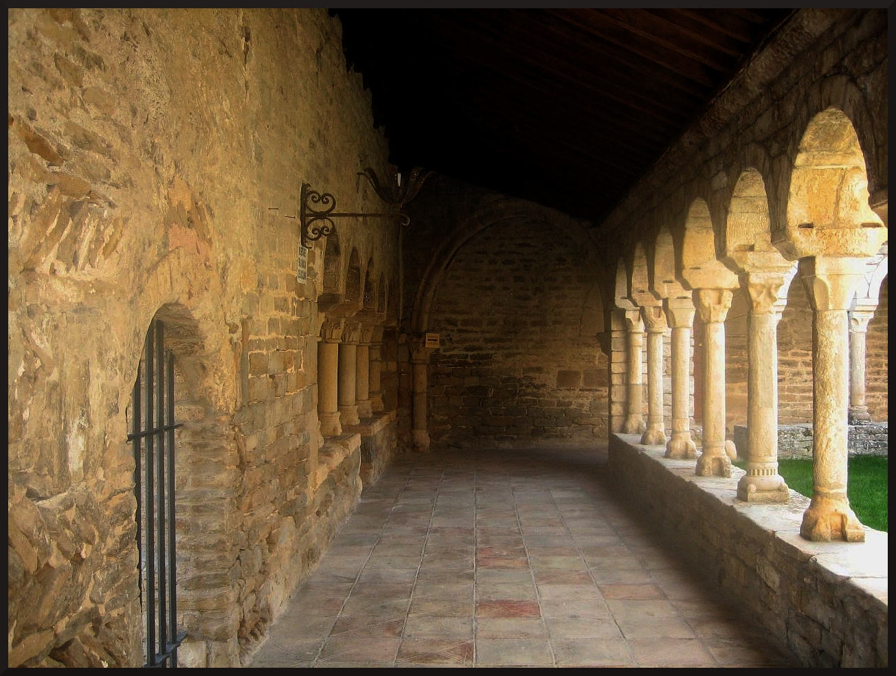 Claustro de la catedral de Roda de Isábena (Huesca, España)